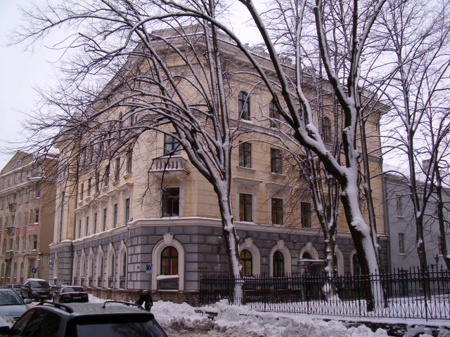 Eesti siseministeeriumi hoone. Tallinn, Pikk tänav 61